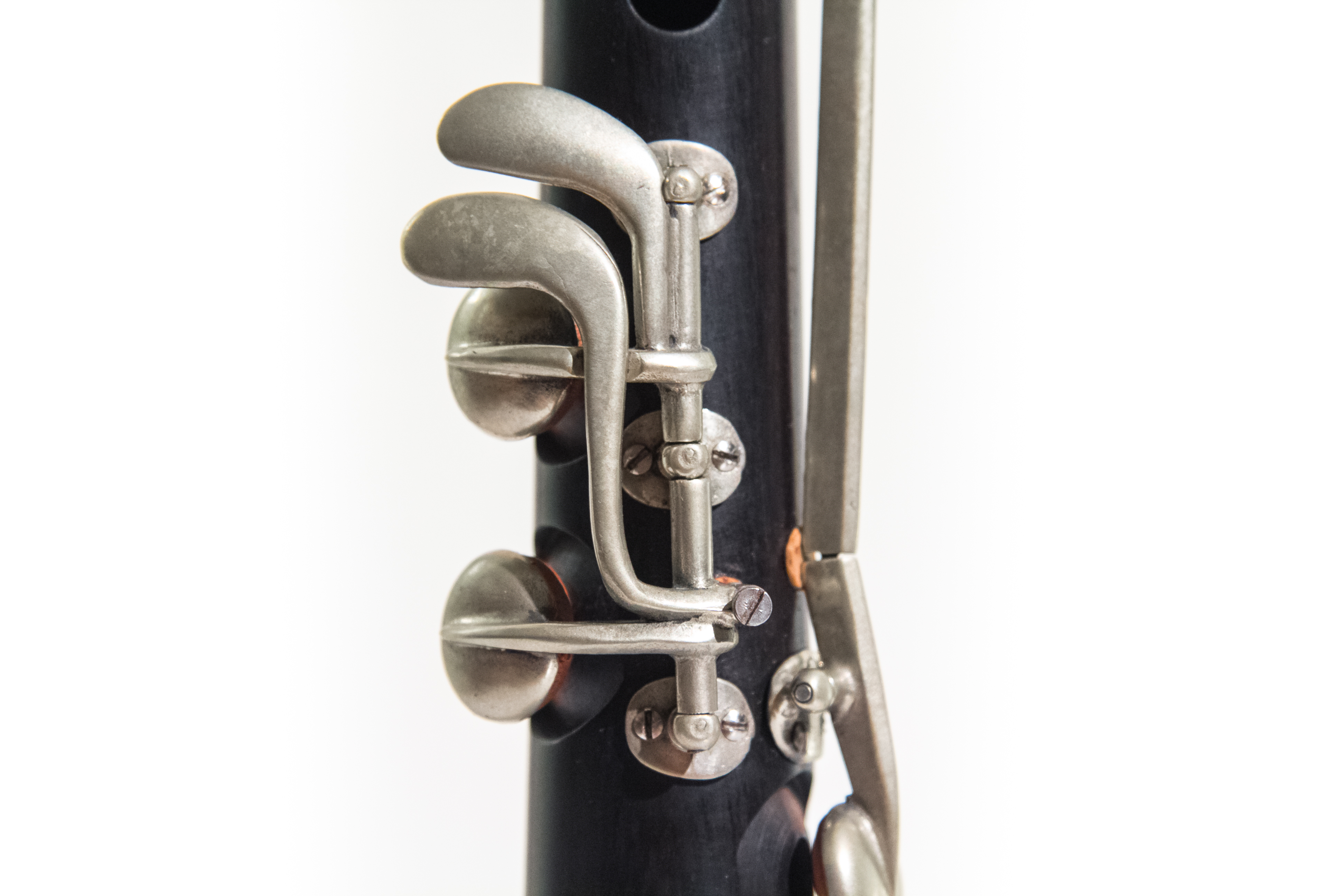 Pla detall del sistema de claus de la gralla dolça, detall de les claus corresponents a les notes Fa3 i Fa#3 (F4 i F#4). Model de gralla dolça del constructor vilanoví Xavier Orriols, feta amb fusta de banús africà.